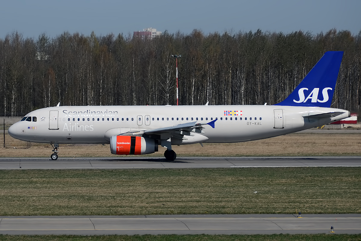 SAS, OY-KAL, Airbus A320-232